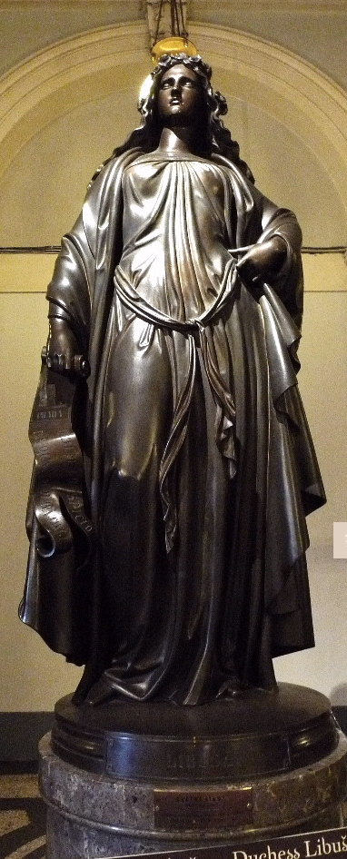 Prag - Ludwig von Schwanthaler/Ferdinand von Miller: Libuše - Standort: Eingangshalle Nationalmuseum